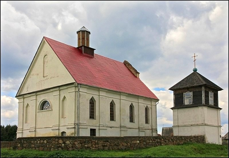 Плябань. Касцёл